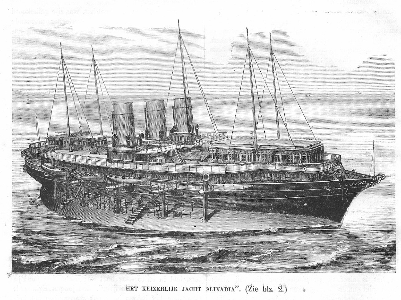 Die kaiserliche Jacht "Liwadija" von Zar Alexander II. von Russland